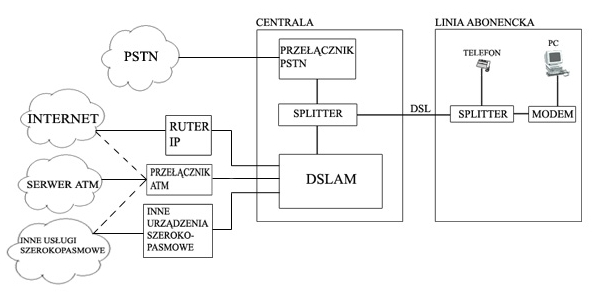 Rysunek przedstawia ogólną architekturę DSLAM.